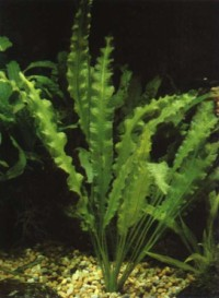 Aponogeton crispus picture owner: Laurentiu Craciunas